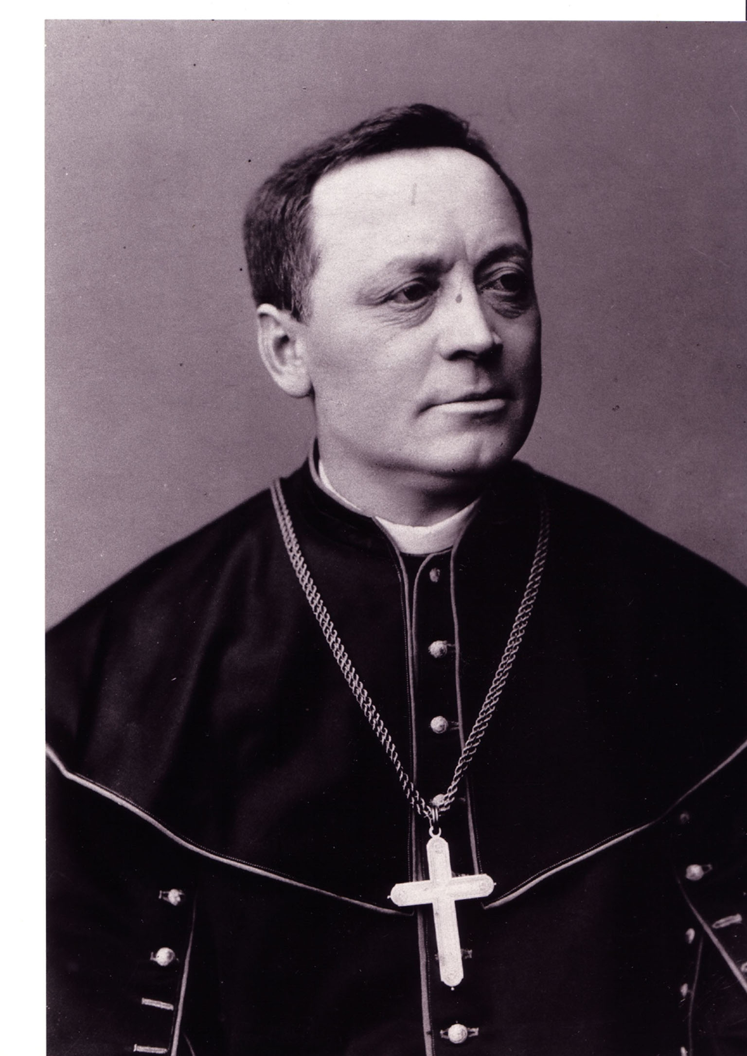 Eigenes Foto, das von einem in Familienbesitz befindlichen Foto angefertigt wurde